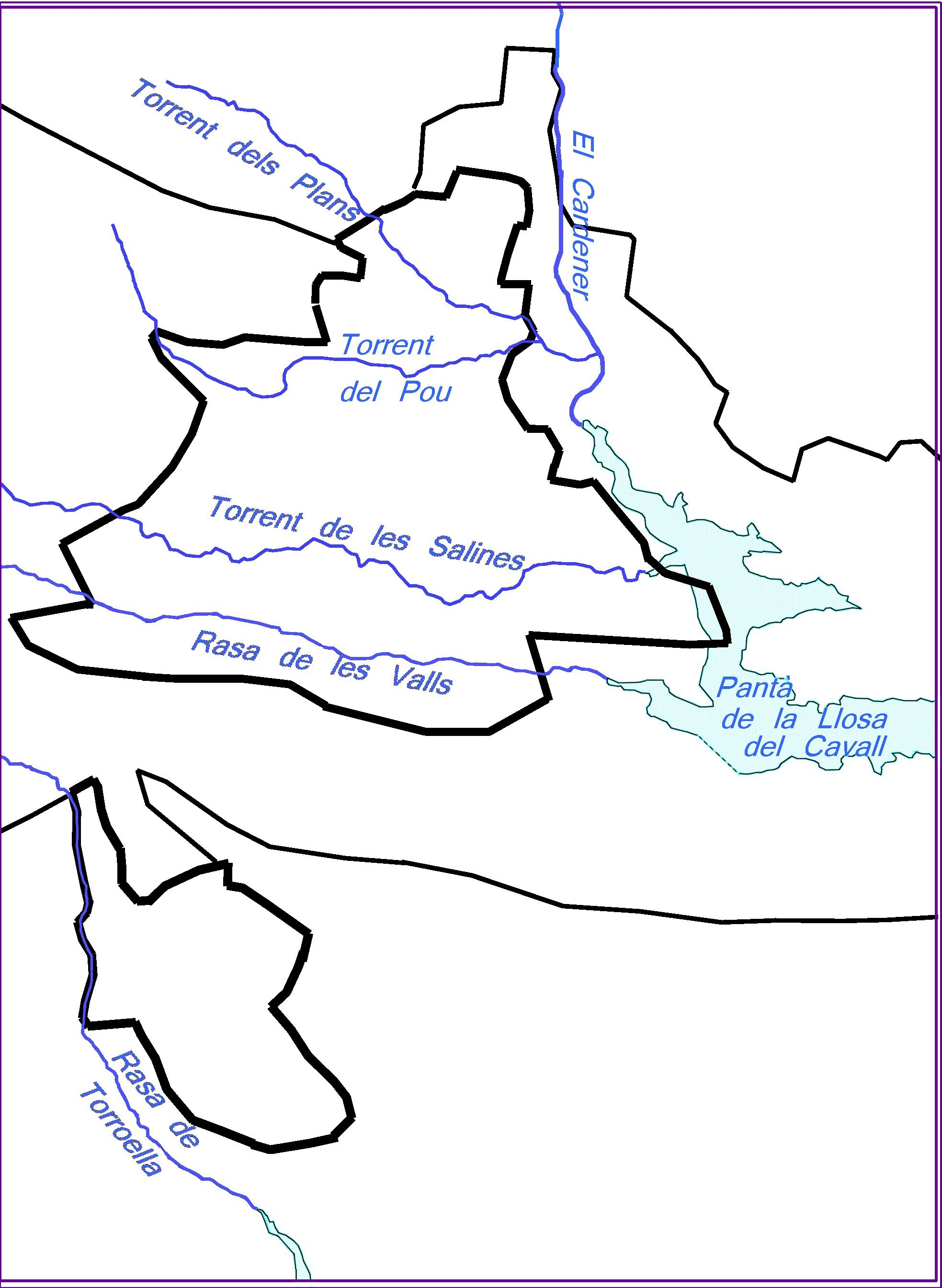 Mapa de la hidrografia del municipi de Sant Llorenç de Morunys (Solsonès) .